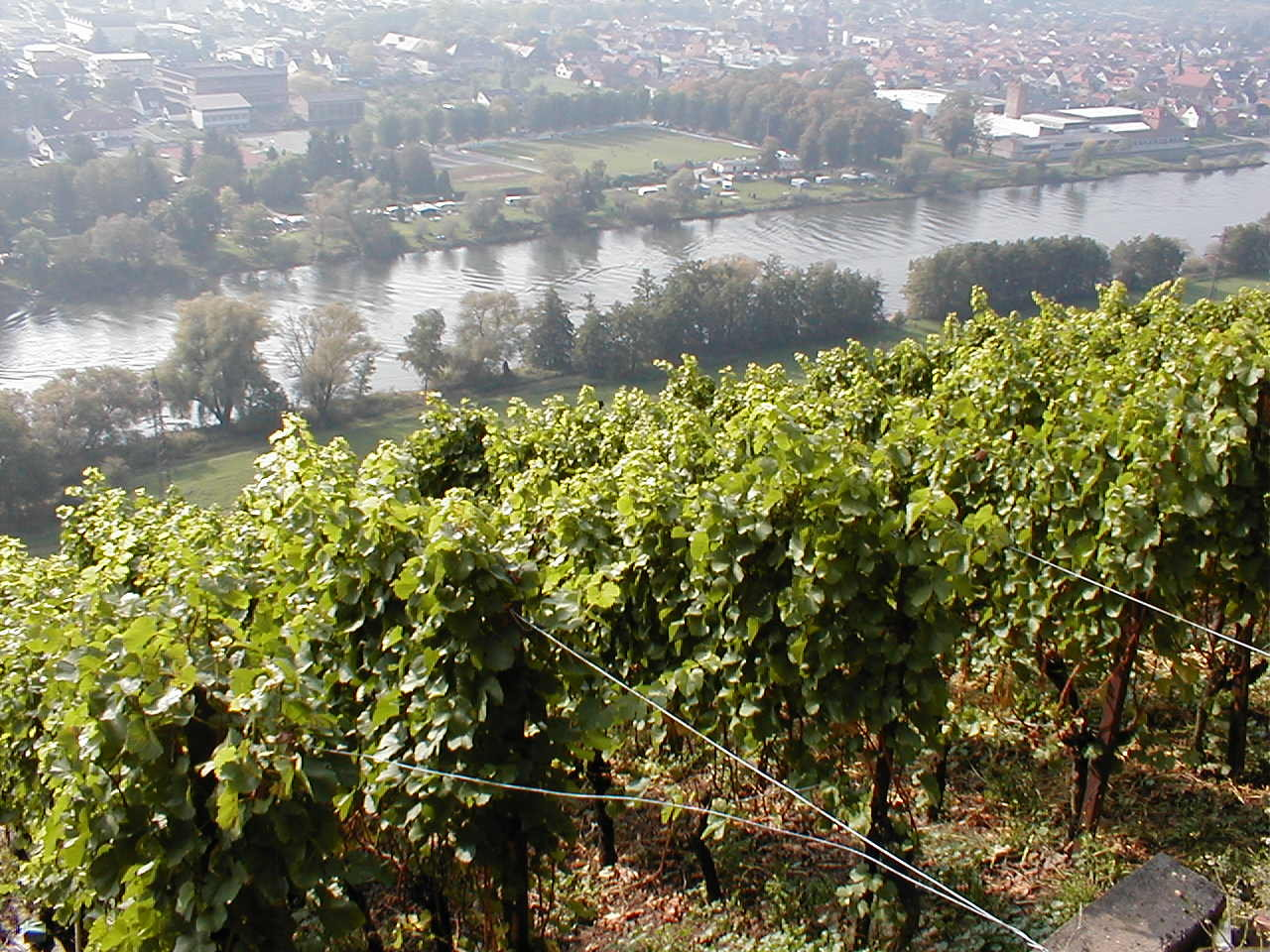 Weinstöcke über dem Main, aufgenommen am 8. Oktober 2005 am Fränkischen Rotwein Wanderweg zwischen Erlenbach und Klingenberg